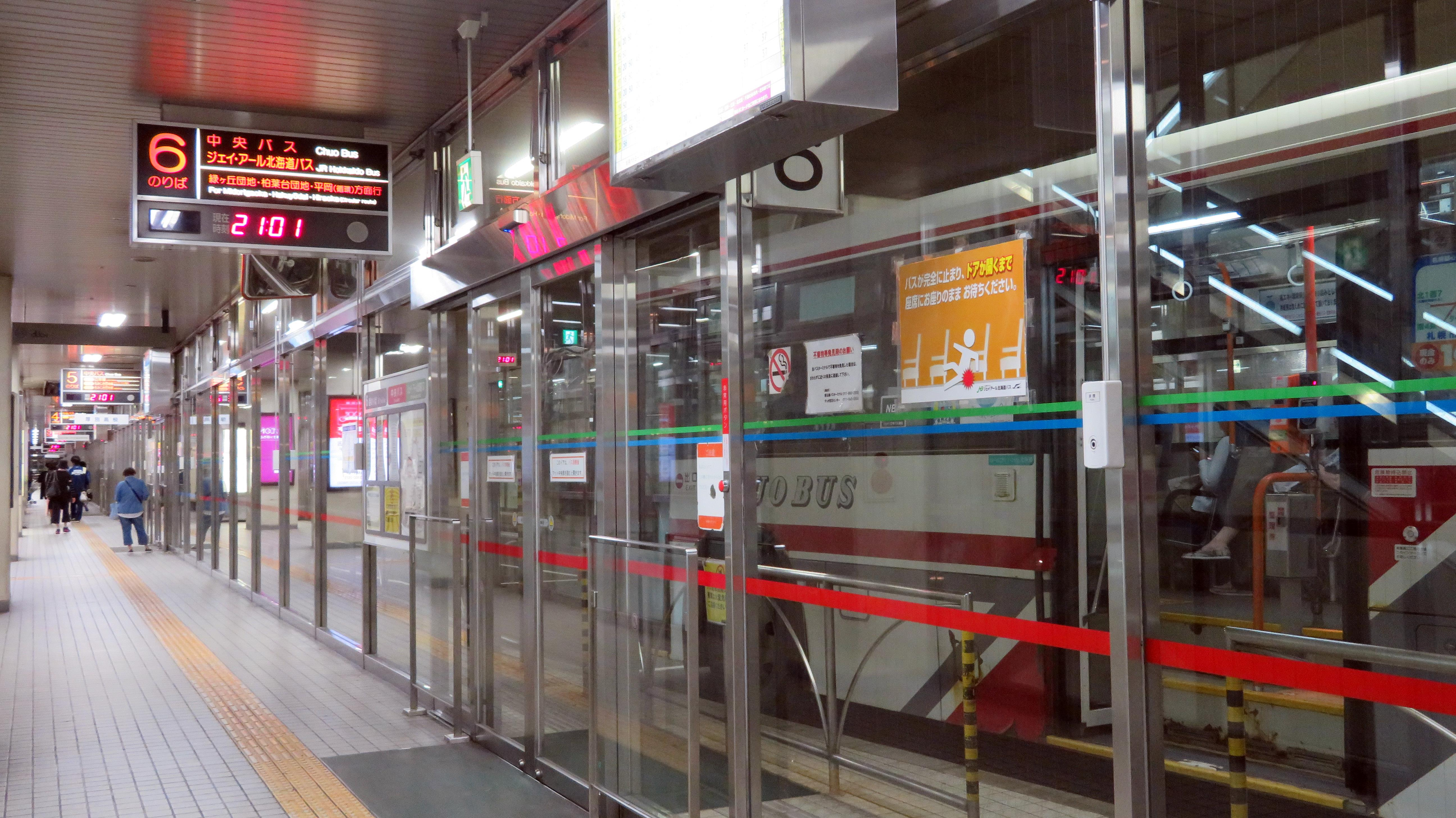 新札幌バスターミナル（南レーン） Canon PowerShot SX720 HS